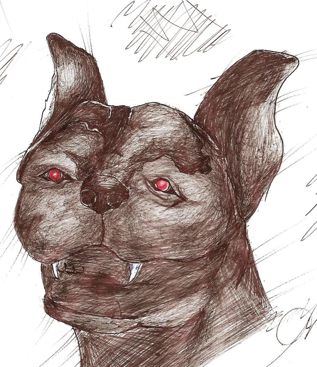 Leyenda, El Cadejo